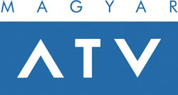 Magyar ATV csatorna logója 2004-től 2006-ig